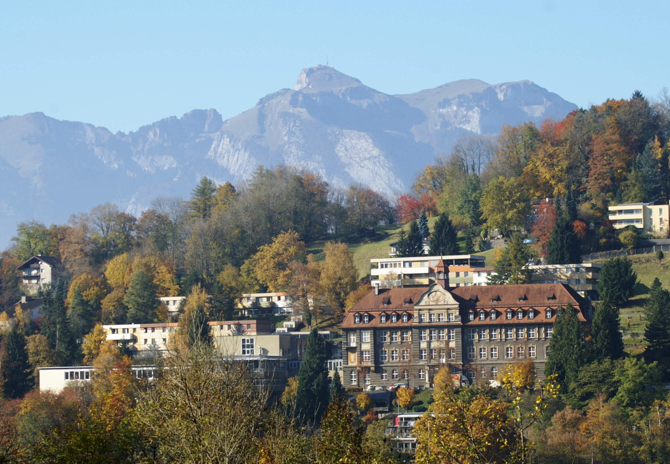 das Institut St.Josef [1] liegt am Fusse des Ardetzenberges in Feldkirch, Vorarlberg und wurde als Schule und Internat in den Jahren 1910/11 erbaut. Blick von der Schattenburg auf den 1795m Hohen Kasten.